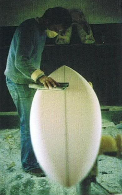 Joël Roux fabriquant une planche